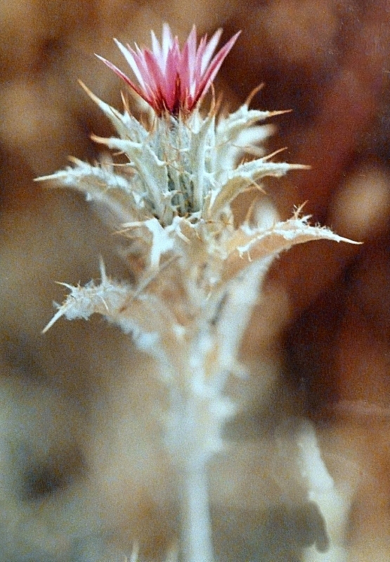 Carlina lanata (cardo peludillo) - Vista lateral - Gerakini Paralia, Península de Halkidiki, Grecia.